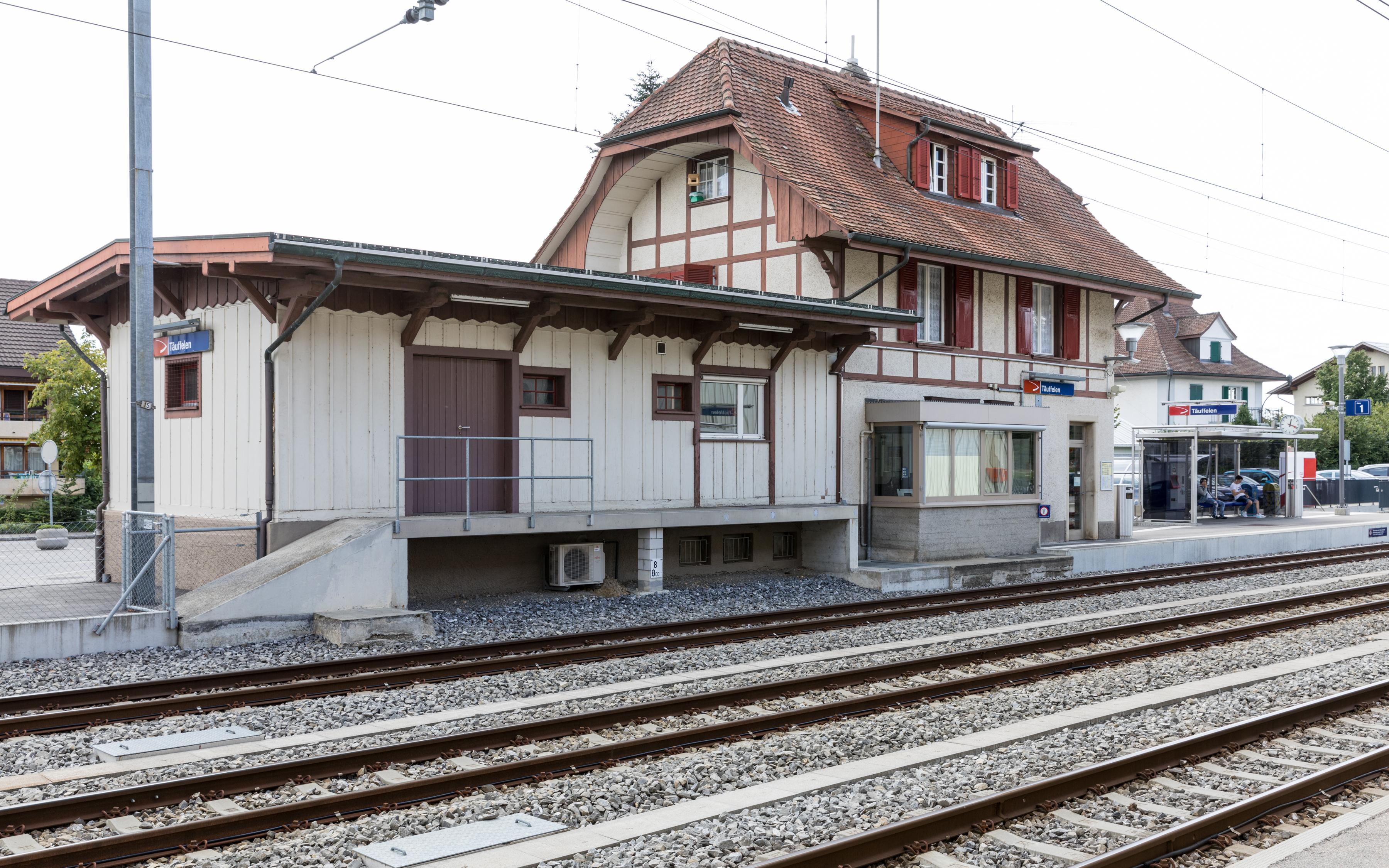 Bahnhof Täuffelen